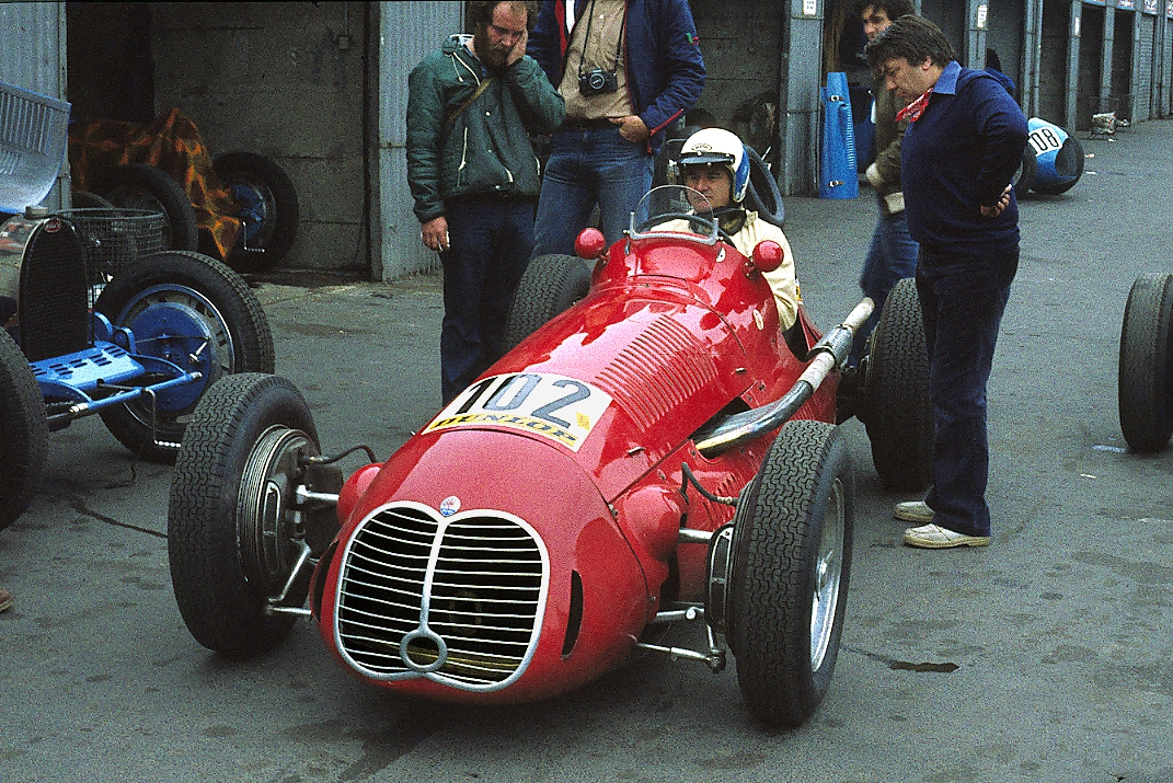 Maserati 4 CL, Baujahr 1939, im alten Fahrerlager des Nürburgrings beim AvD-Oldtimer-Grand-Prix 1979. Fahrer: Dan Margulies (* 26.06.1925, † 04.09.2010)